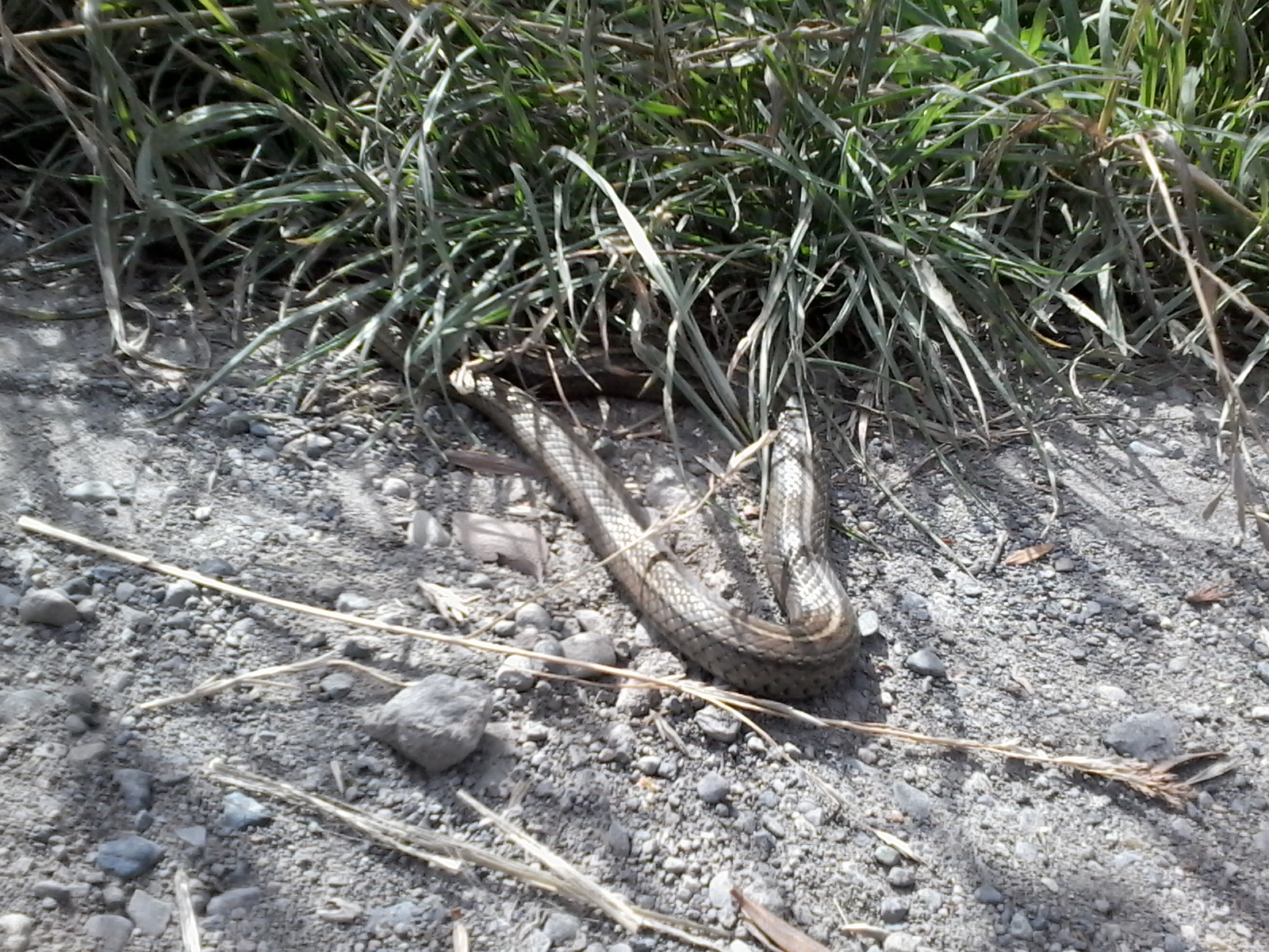 Culebra de cola corta.